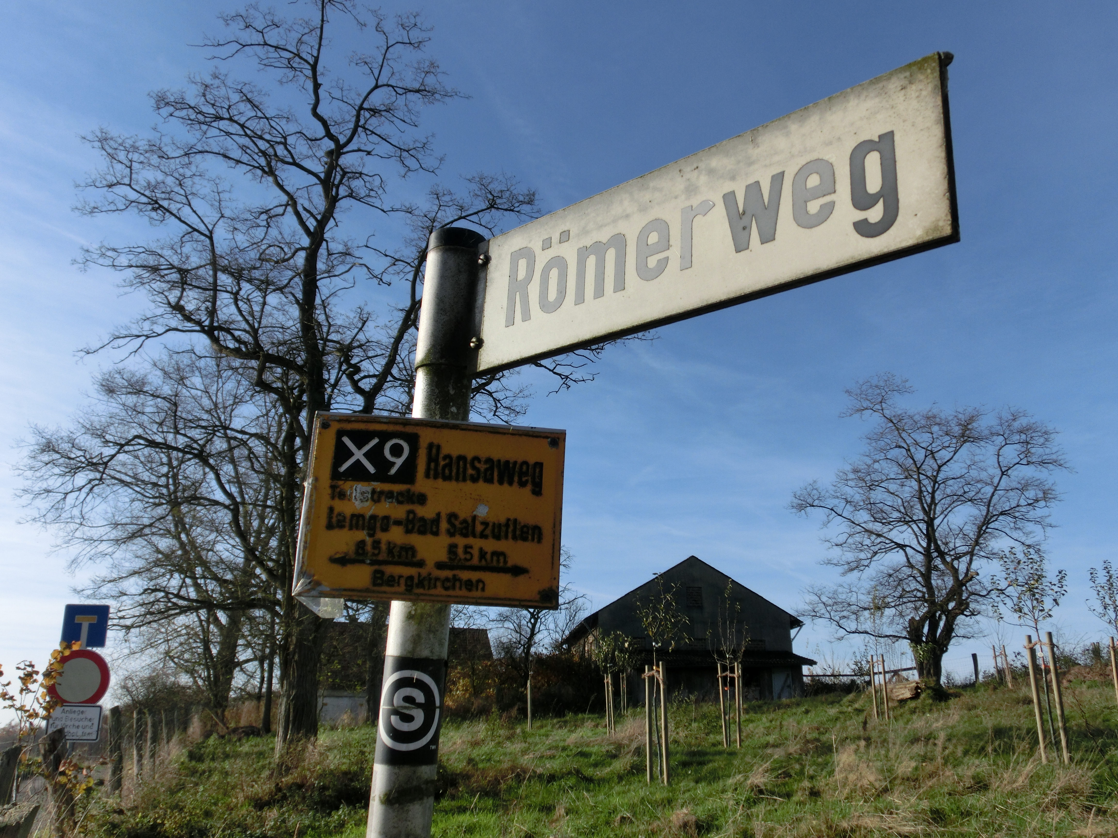 Deutschland (D) - Nordrhein-Westfalen (NW) - Kreis Lippe (LIP) - Bad Salzuflen: Römerweg